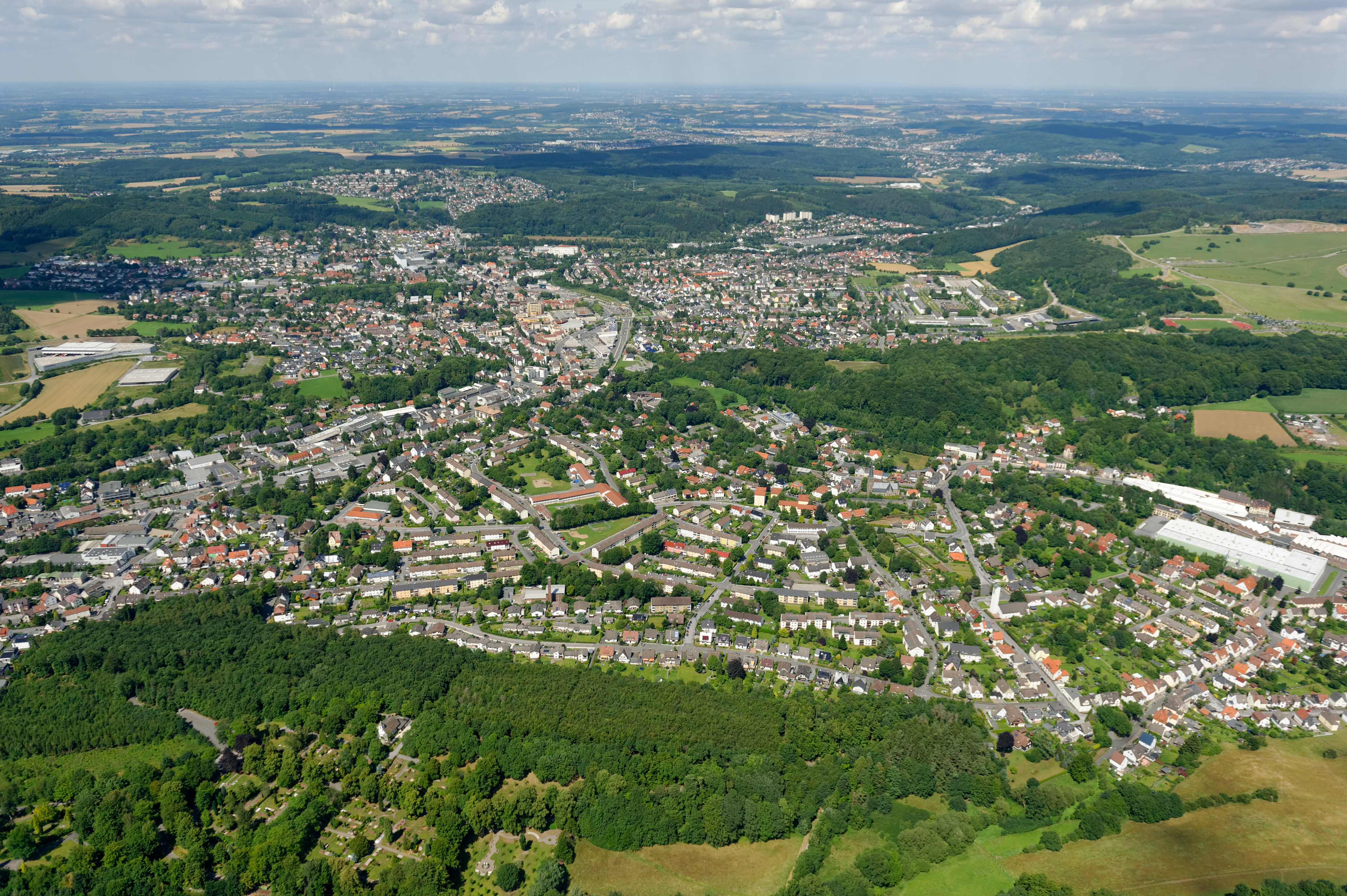 Luftaufnahme: Hemer von süden, Nordrhein-Westfalen